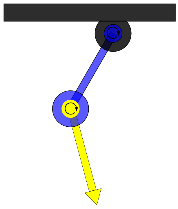 schematische Zeichnung eines Doppelpendels Selber gezeichnet